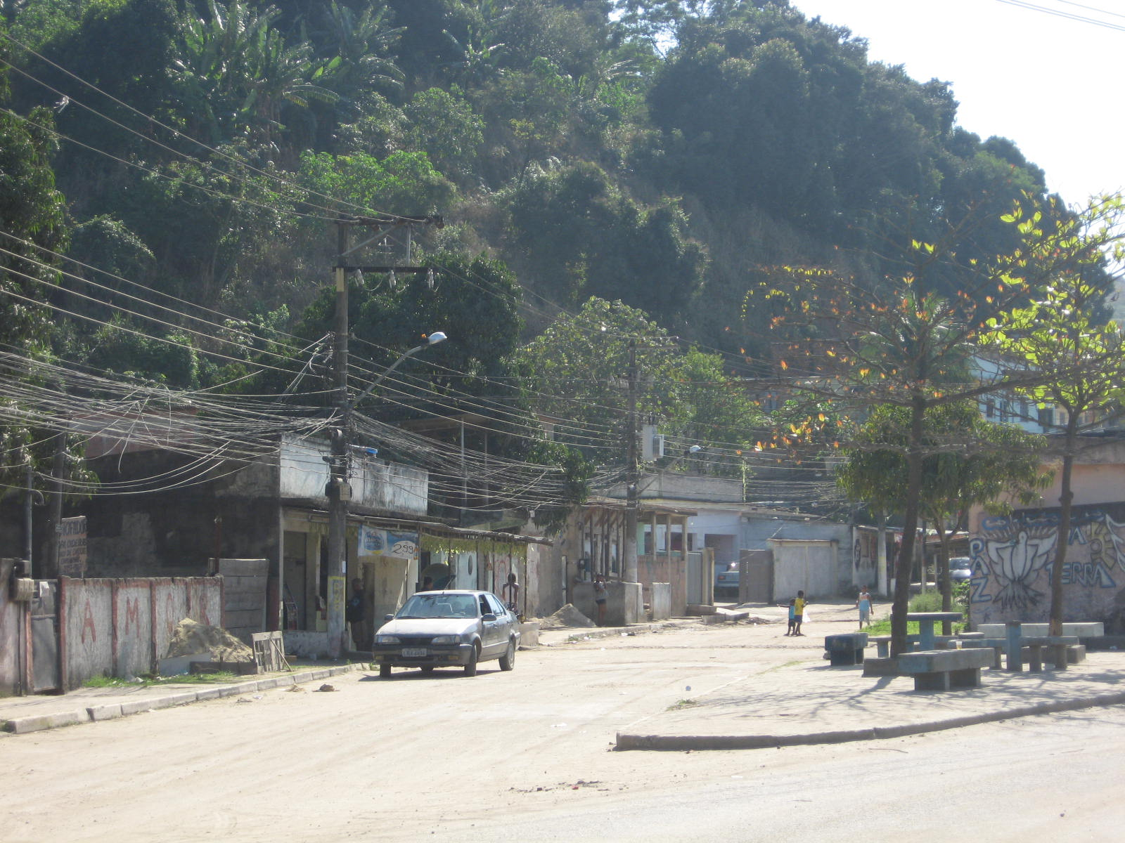 Vista do bairro de Venda Velha, em São João de Meriti, no estado do Rio de Janeiro.